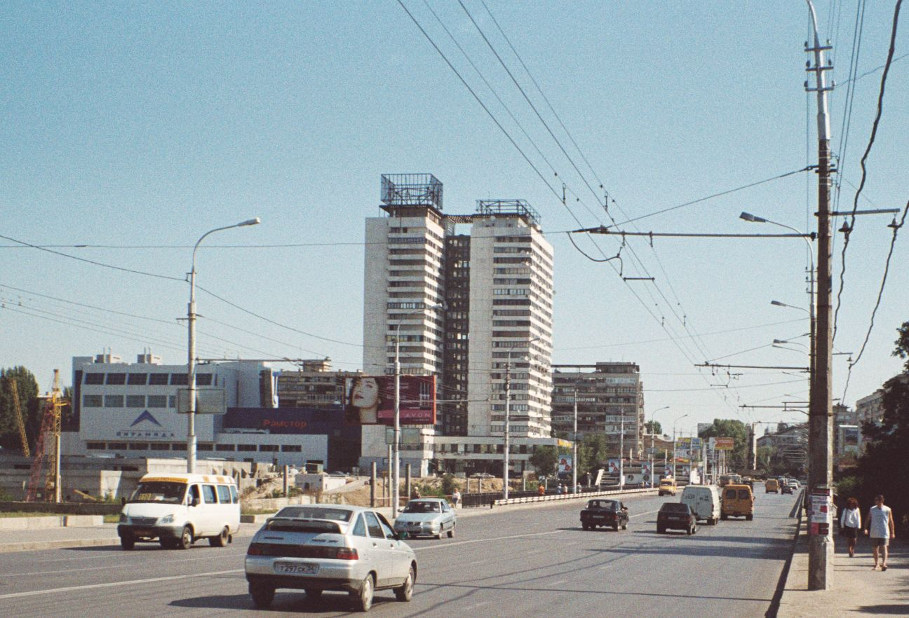 eo Nova oficeja konstruajxo sur cxefa strato de urbo Volgograd kaj trolebusa kontakta linio (2005). ru Новое офисное здание на главной улице Волгограда и троллейбусная контактная линия (2005). La fonta bildo de cxi tiu bildo estas ankaux en mia propra retpagxaro [1] Mi, auxtoro de la bildo, permesas al cxiuj uzi gxin kun cxi tiuj kondicxoj